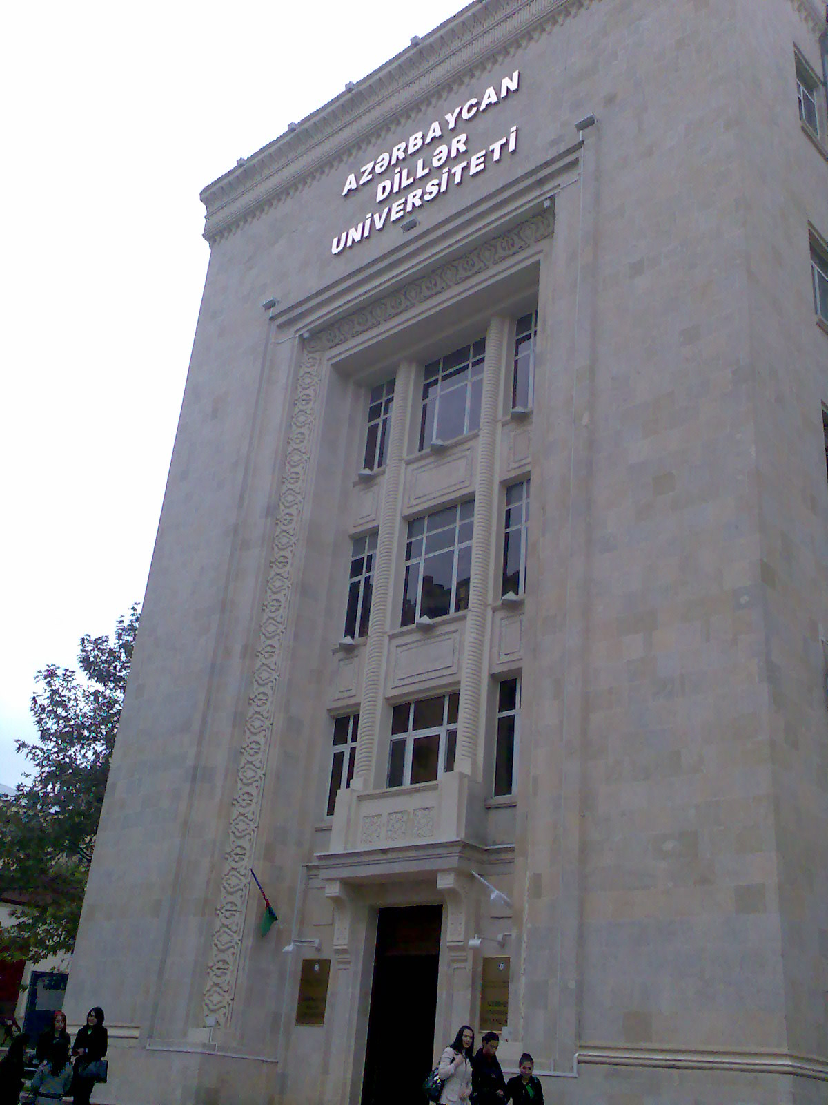 Азербайджанский университет иностранных языков